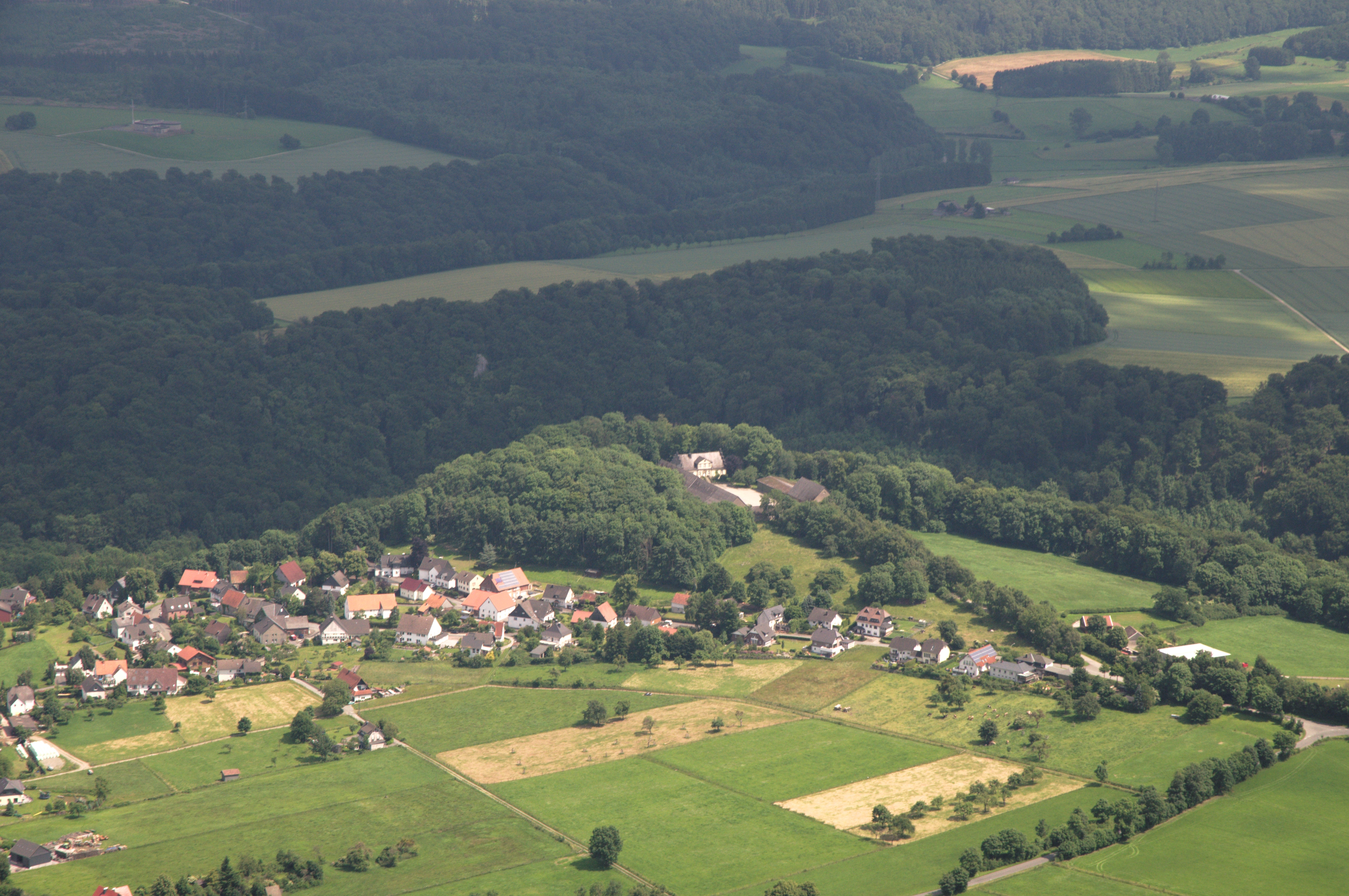 Fotoflug Sauerland-Ost, Oberalme, Haus Tinne vor dem Buttenberg, Almequelle, NSG Tinne/Nehder Kopf,HSK-026E1, Almetalbahn